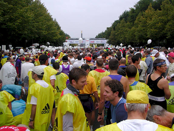 Beim Berlin-Marathon 2004 im Startblock E wenige Minuten vor dem Startschuss.